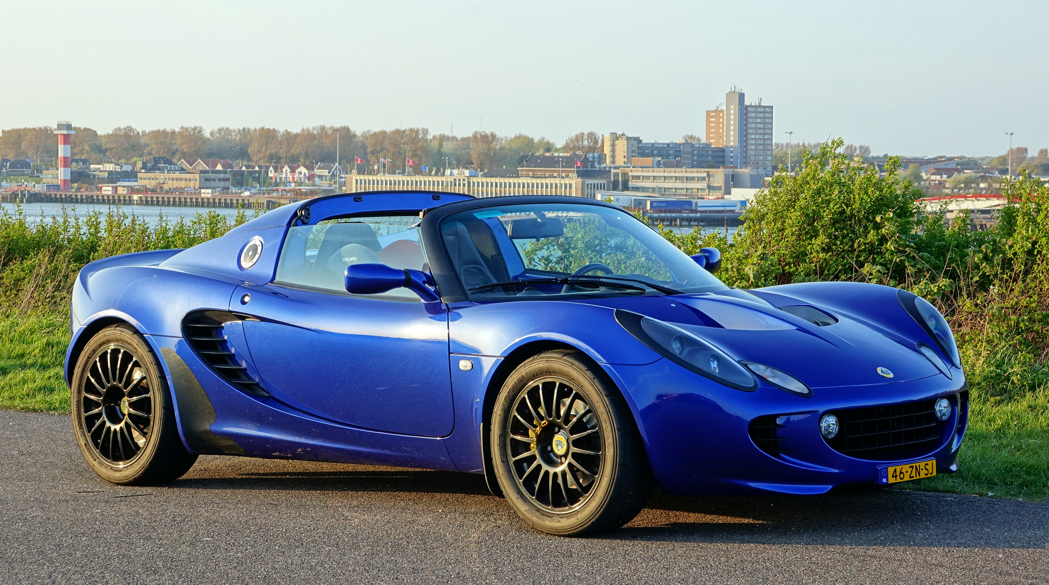 Landtong Rozenburg